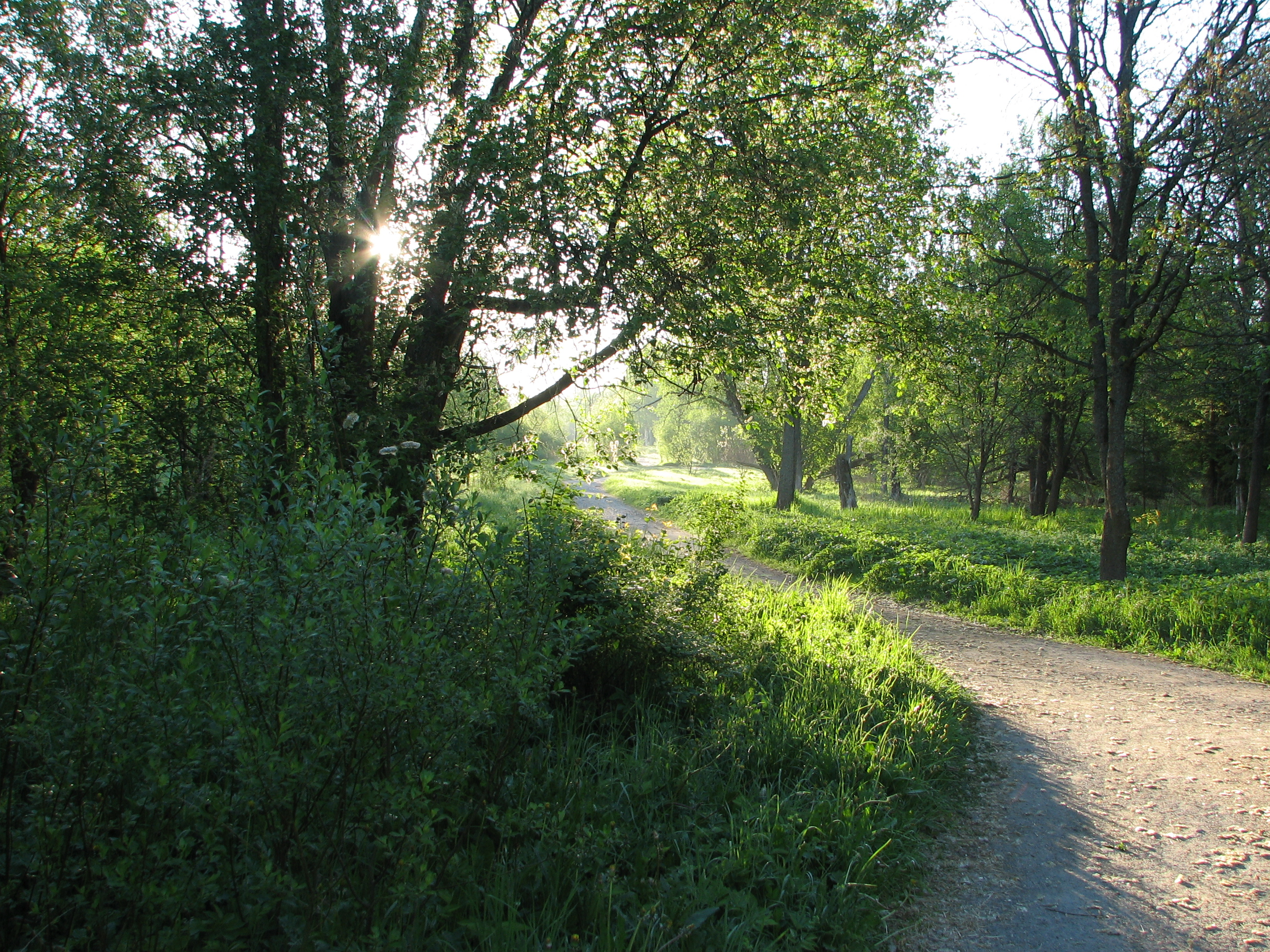 Вид на «Гатчинскую „чудо-поляну“» — планируемый памятник природы в Гатчине. Около 6 часов утра.